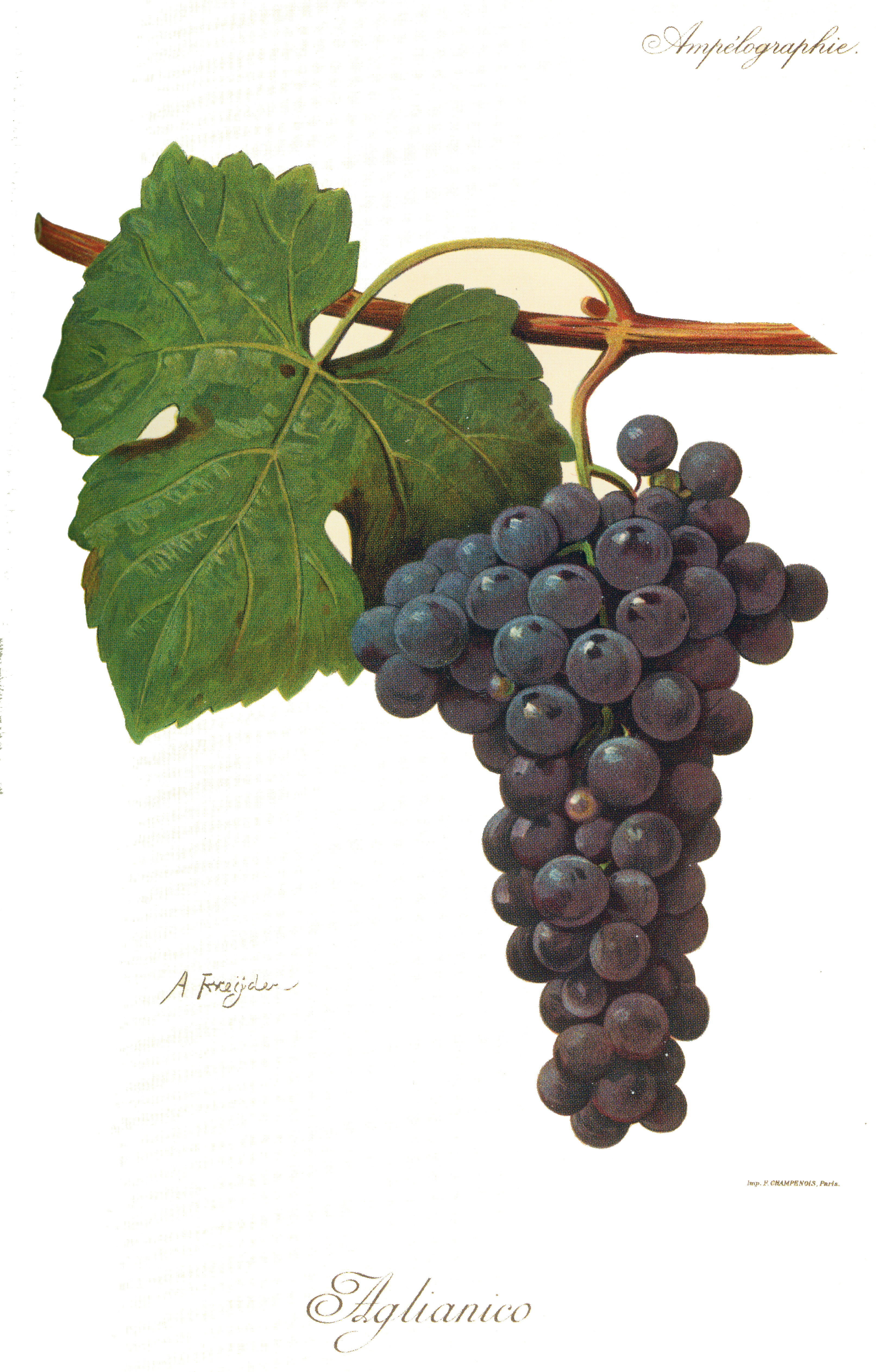 Aglianico w L'Ampélographie Viali i Vermorela (1901-1910)